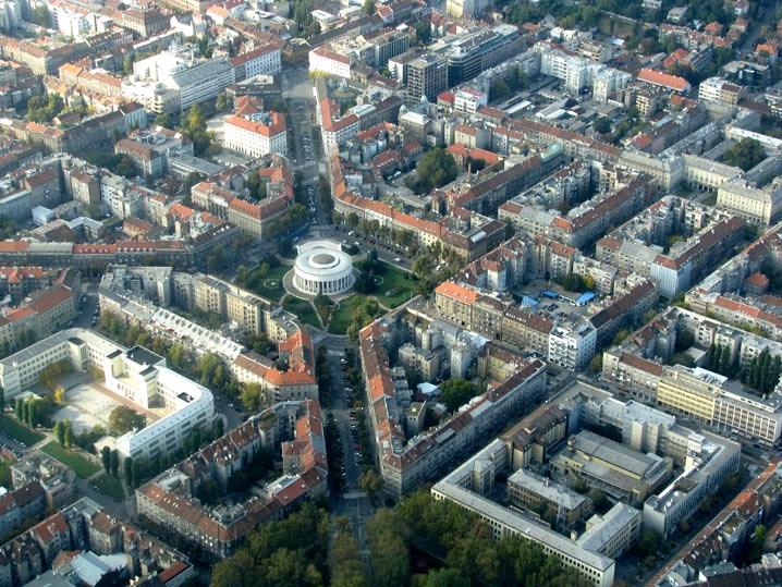 Pogled na Meštovićev paviljon (popularna Džamija) i okolne ulice iz zraka